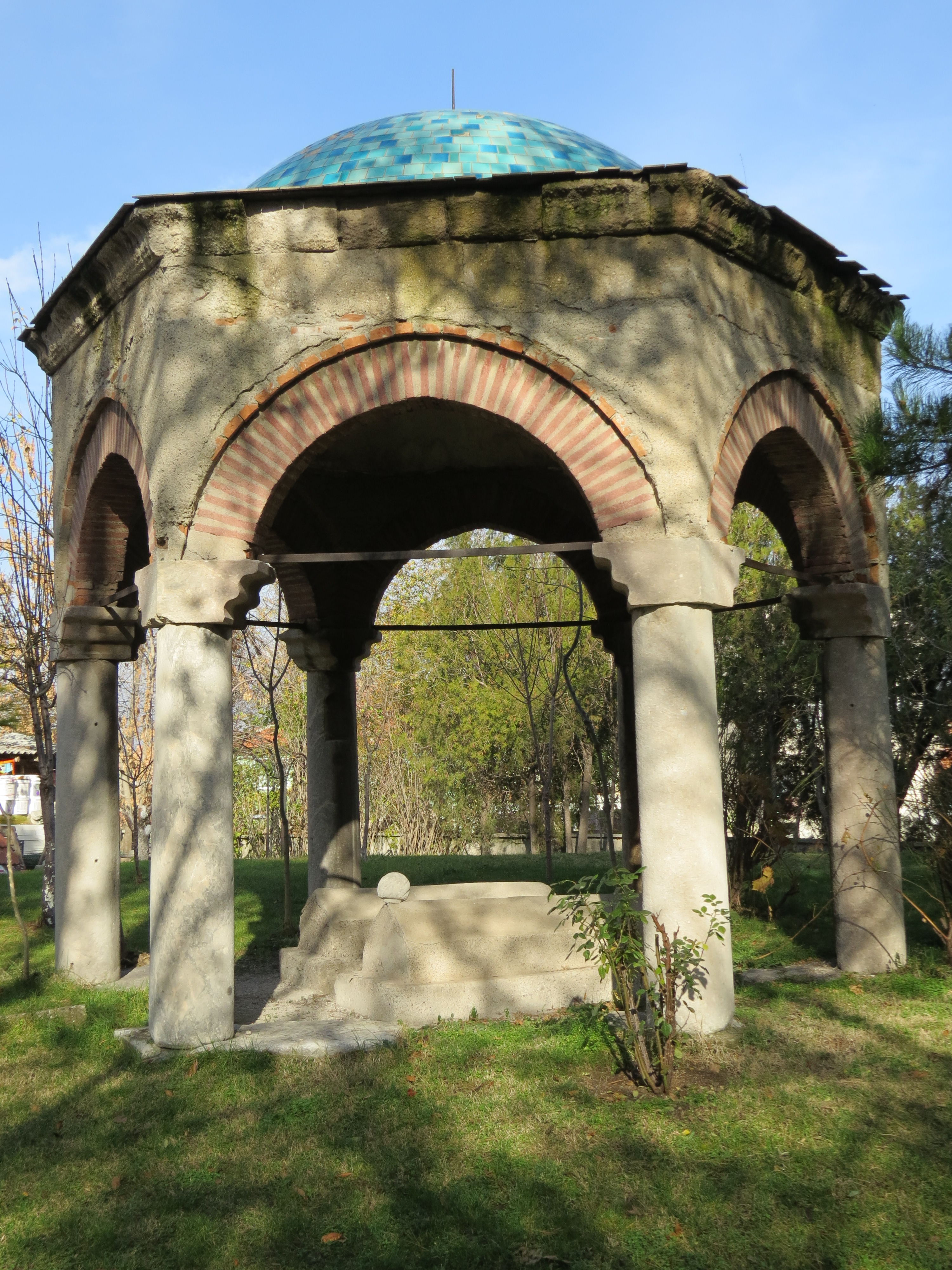 Karagöz Ahmed Paşa Türbesi